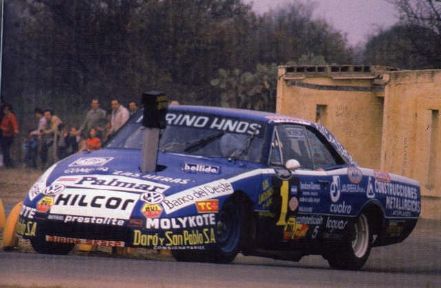 Roberto Mouras en La Plata 1984, sobre su Dodge GTX.